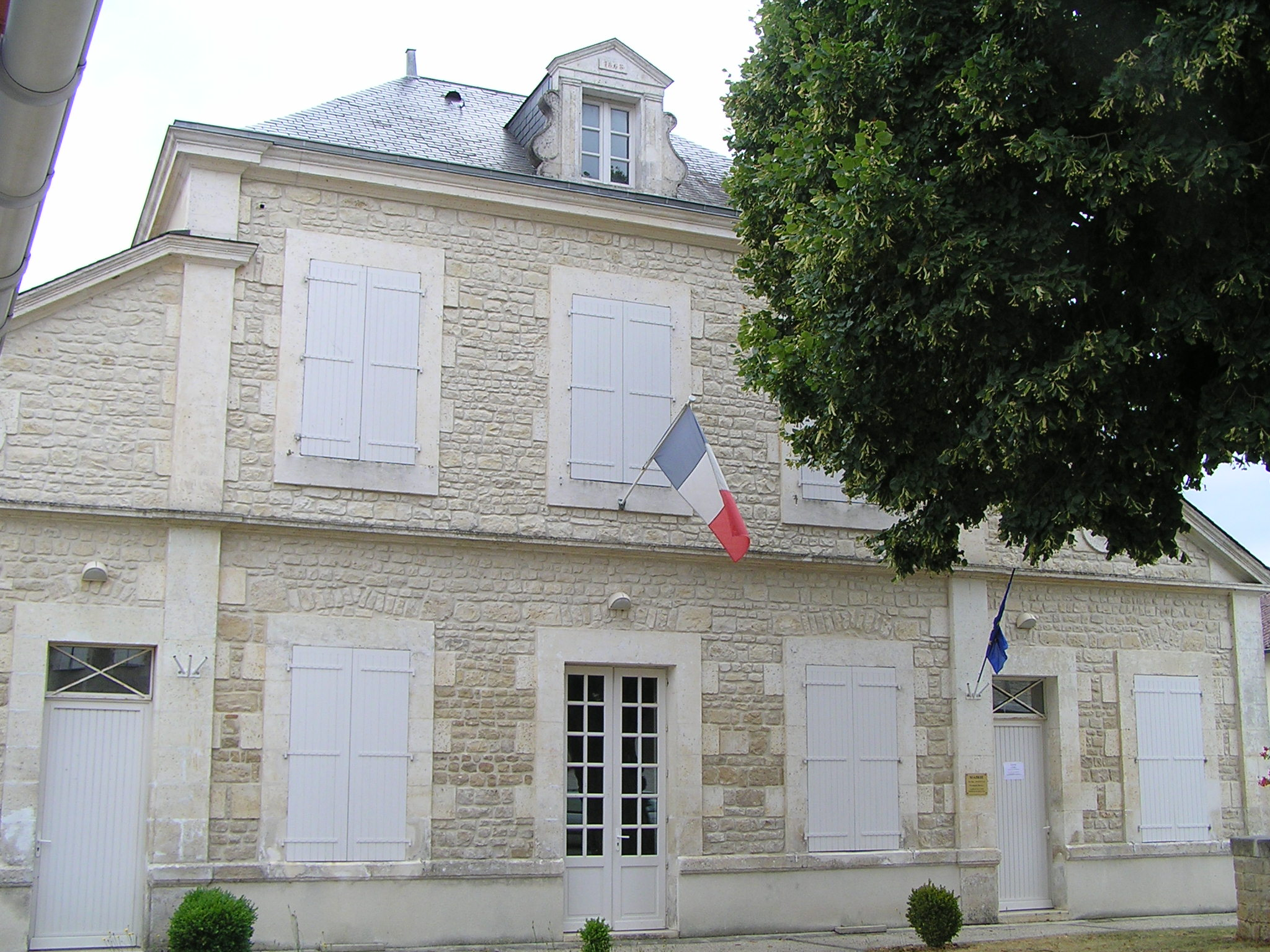 mairie de Vouharte